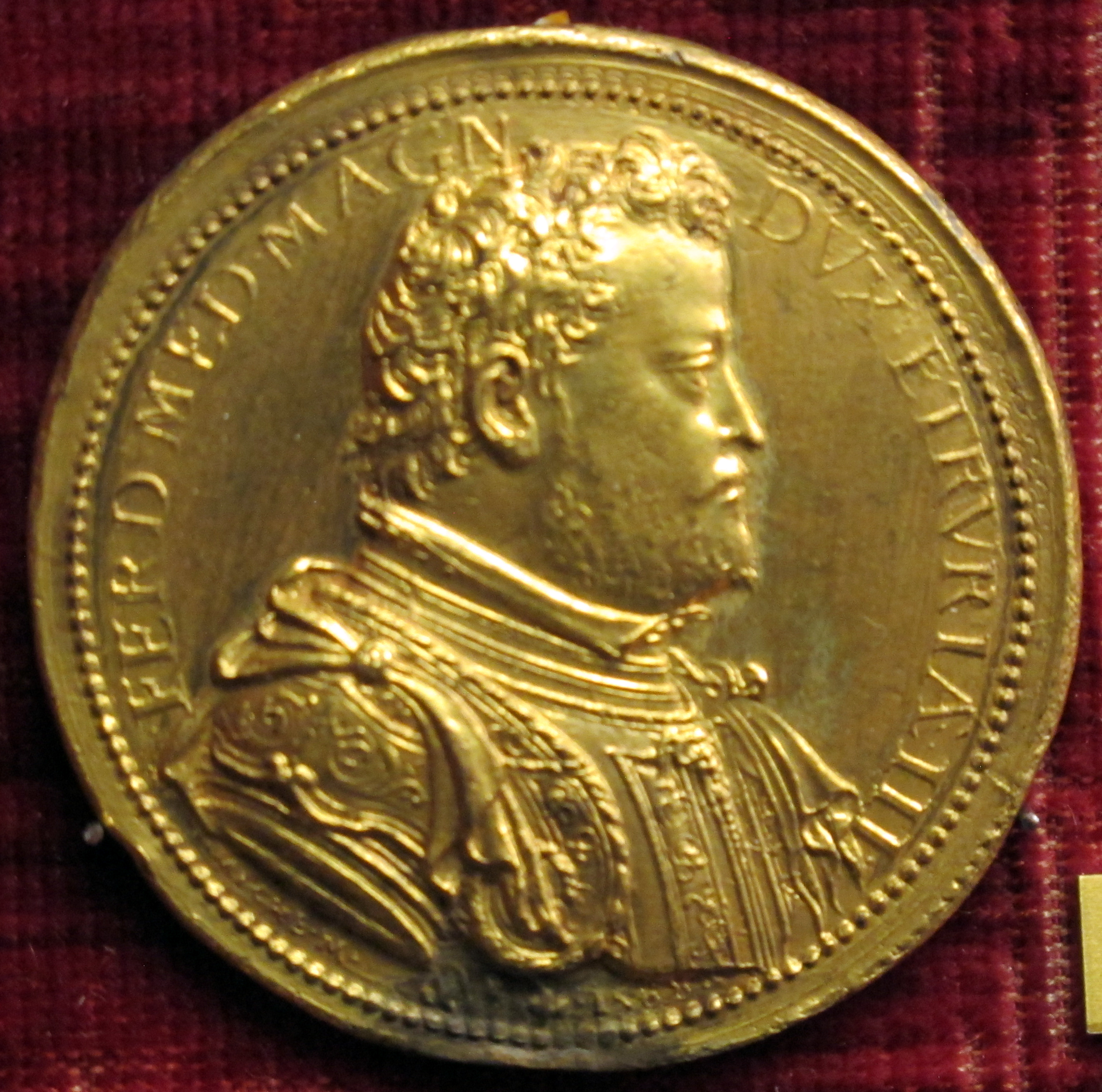 Medaglia di ferdinando de' medici duca e fortezza di livorno, 1588 (bronzo dorato)